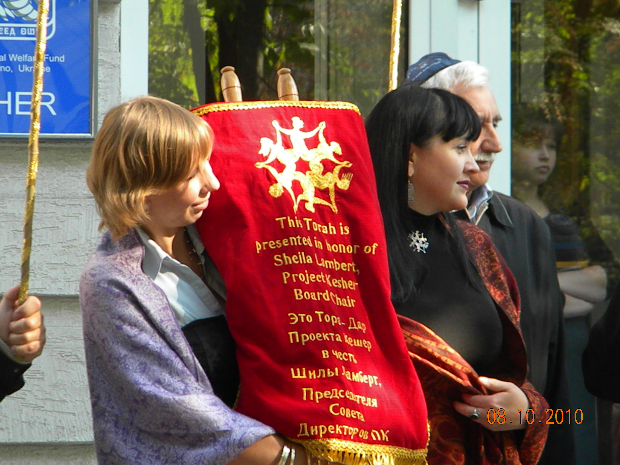 Передача Сувоїв Тори жіночій групі ПК «Атиква», Рівне, 2010